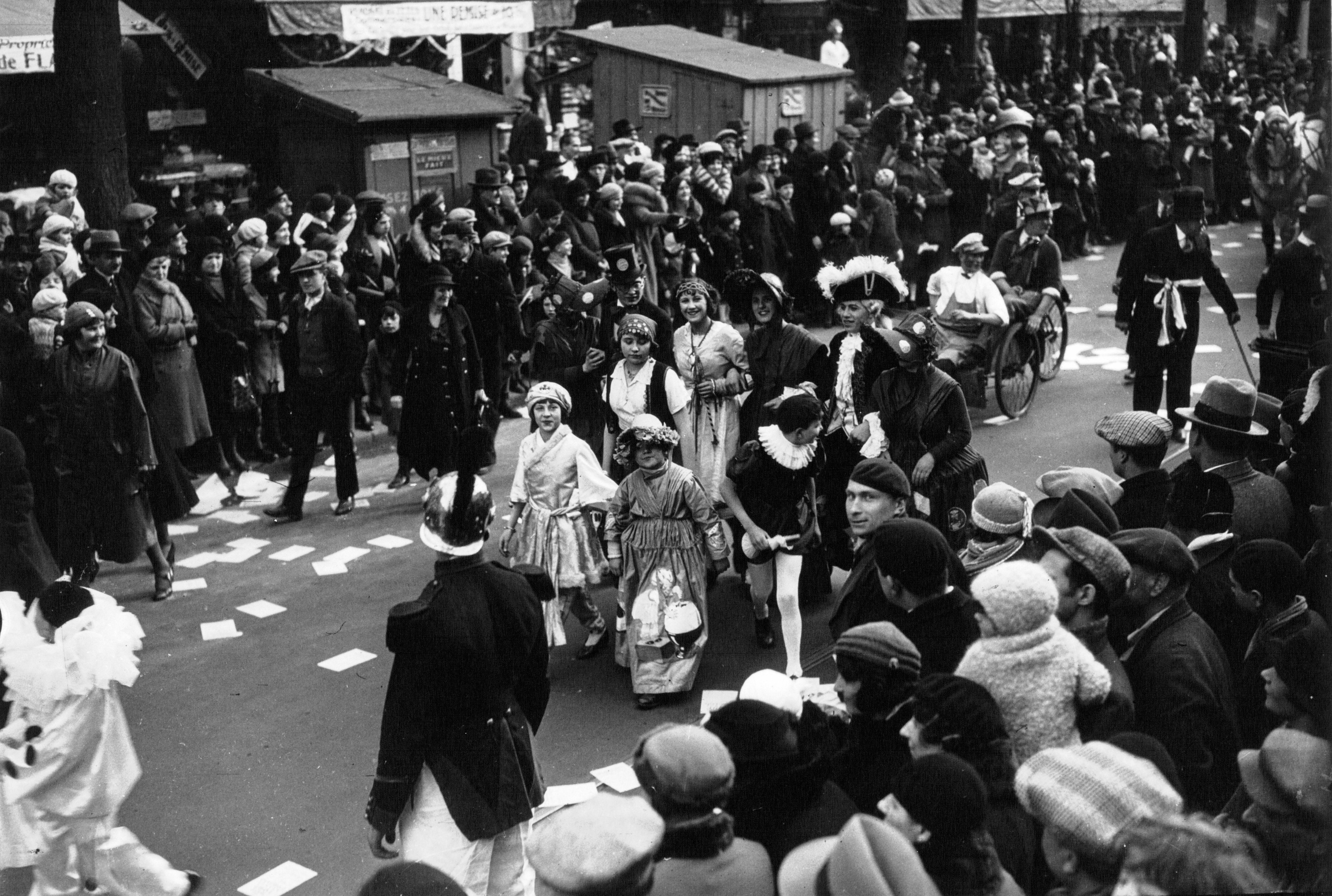 La Cavalcade de l'avenue d'Orléans le jeudi de la Mi-Carême 8 mars 1934.